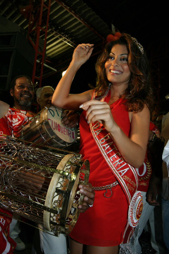 09/11/2003 - A atriz Juliana Paes é coroada a nova rainha da bateria da escola de Samba Unidos do Viradoro, em Niterói. Foto de Andréa Farias